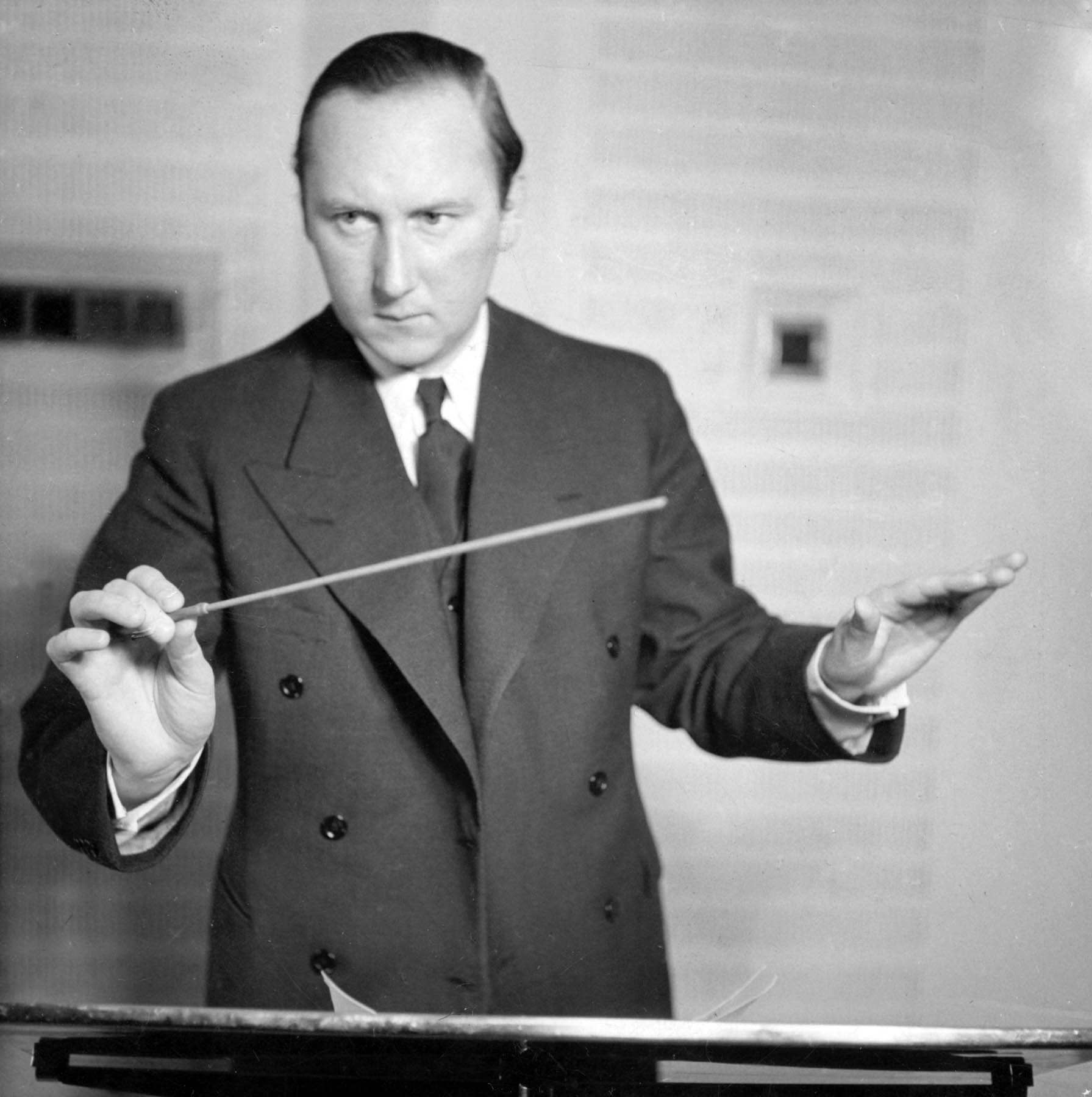 Young Lars-Erik Larsson, born 1908